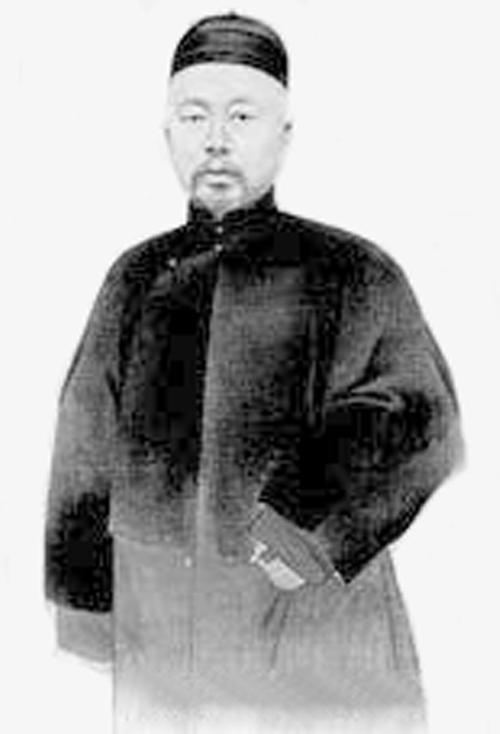 凤山，清朝官员